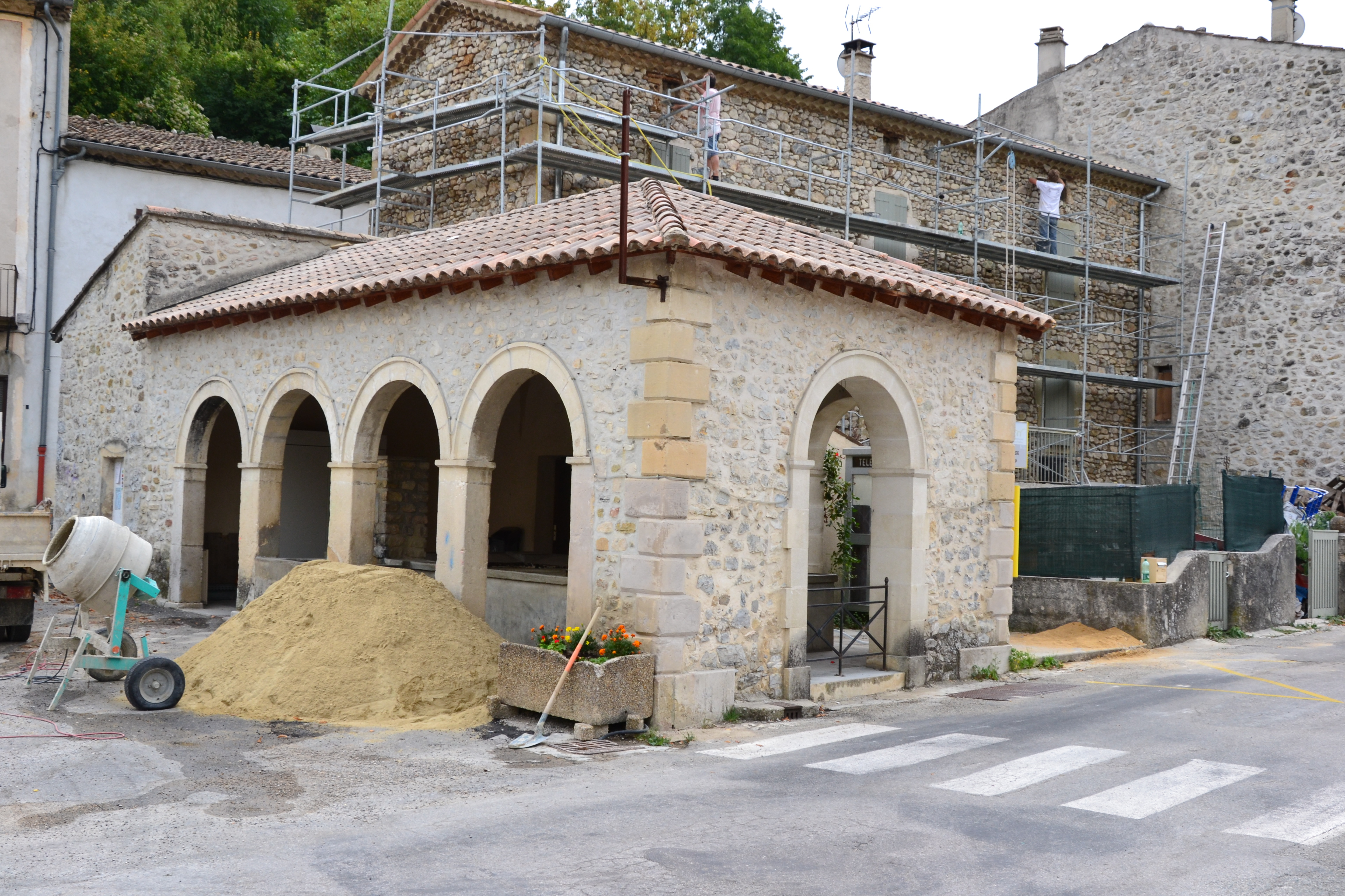 Lavoir de Bouvières